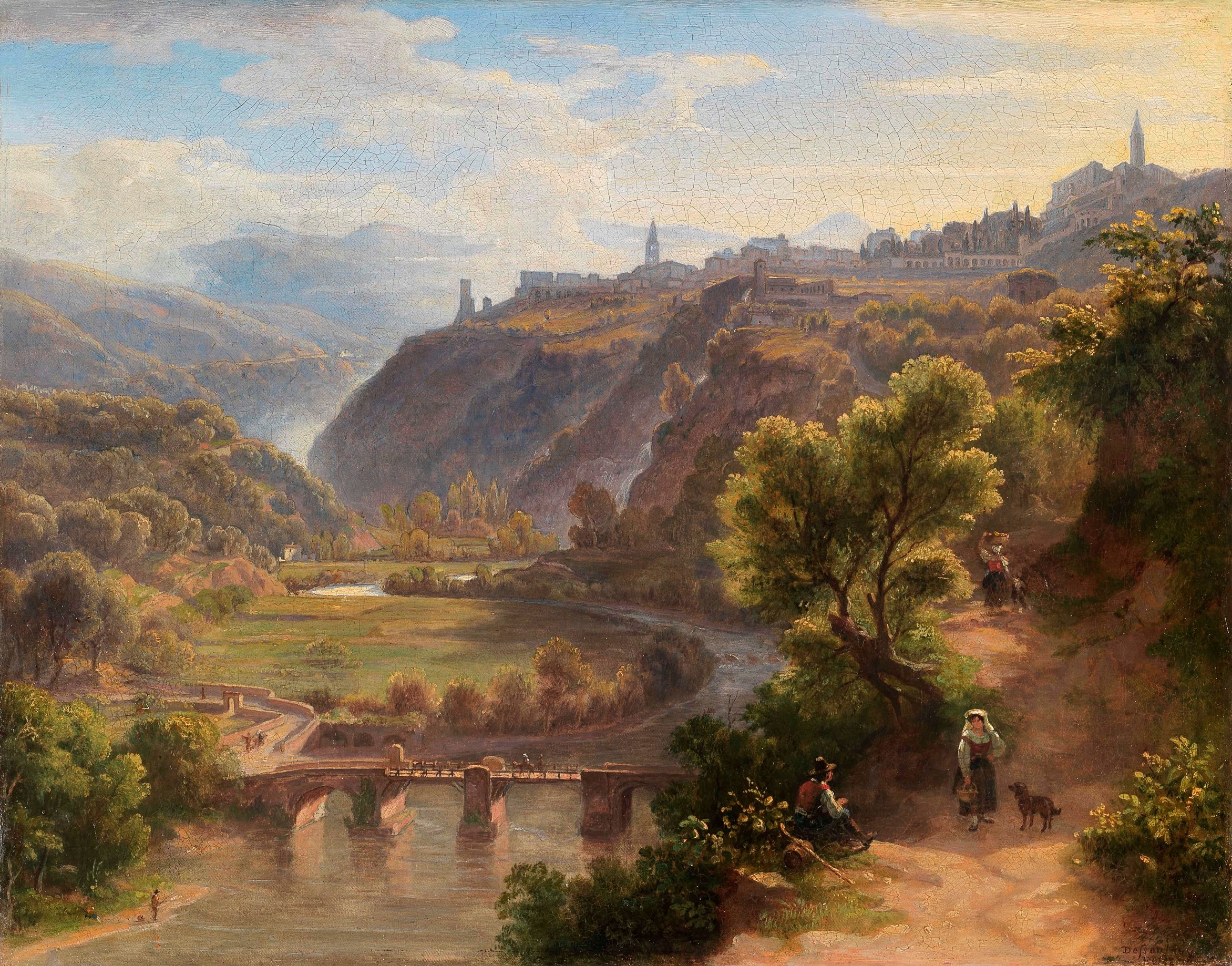 Veduta del Ponte dell'Acquoria a Tivoli, olio su tela, cm. 37 x 47, firmato e localizzato in basso a destra: Dessoulavy Roma, databile intorno al 1830/1840. Rappresenta sulla destra il diverticolo per il ponte dell’Acquoria a Tivoli, che scendeva poco prima del Tempio della Tosse (anch’esso visibile). In alto la città di Tivoli, con il punto più alto costituito dal campanile di S. Maria Maggiore (S. Francesco), la villa d’Este, il campanile della Cattedrale di S. Lorenzo con i criptoportici di Piazza Domenico Tani, il santuario d’Ercole, all’epoca chiamato villa di Mecenate, le cascatelle, la chiesa di S. Antonio da Padova sui ruderi della cosiddetta villa di Orazio lungo la strada per Quintiliolo, in basso il ponte dell’Acquoria, con la caratteristica forma ad S, dal momento che è costituito da due ponti trasversalmente raccordati tra loro.